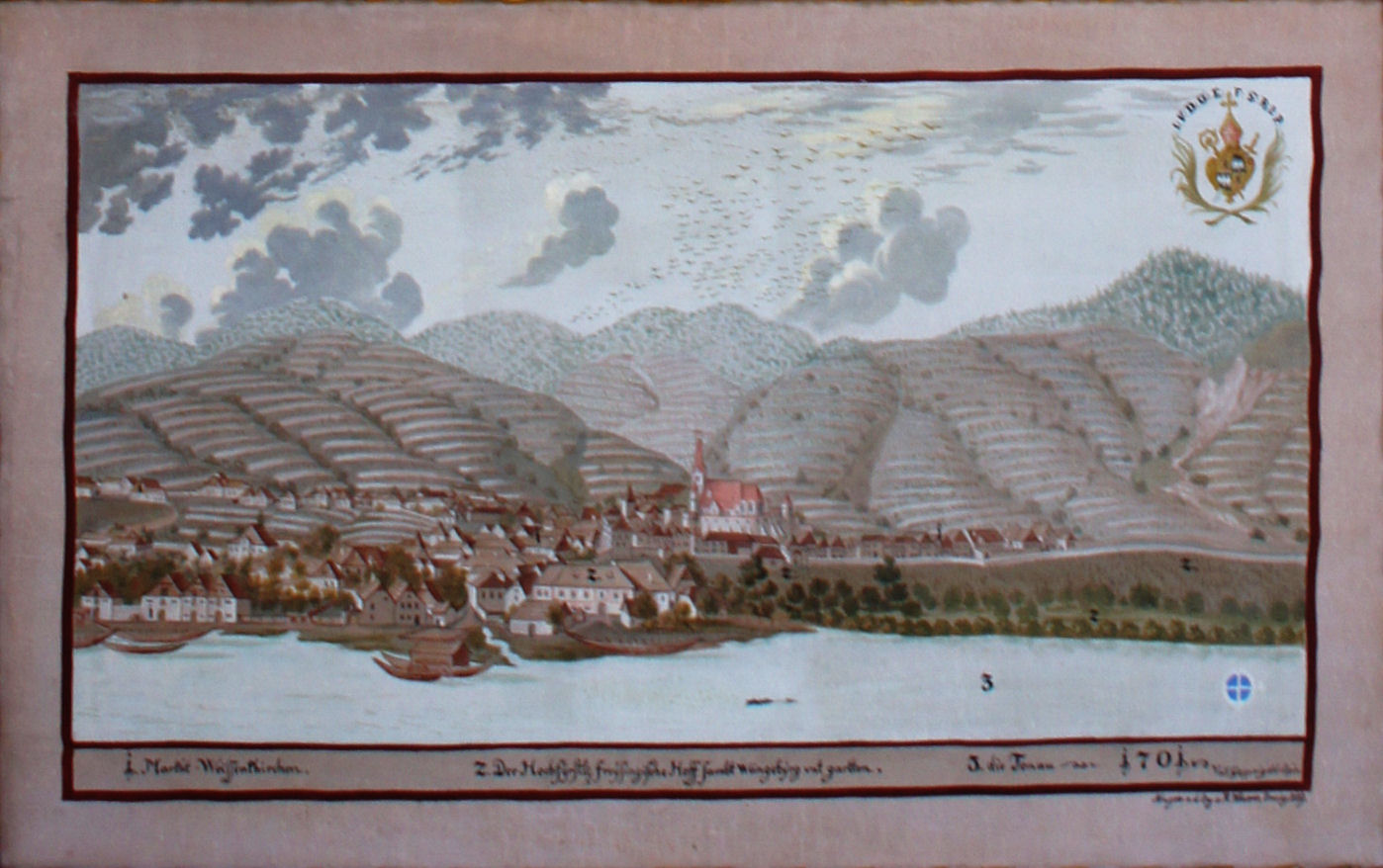 Gemälde aus einer Serie mit Darstellungen von Besitztümern des Hochstifts Freising im Fürstengang zwischen Fürstbischöflicher Residenz und Freisinger Dom.